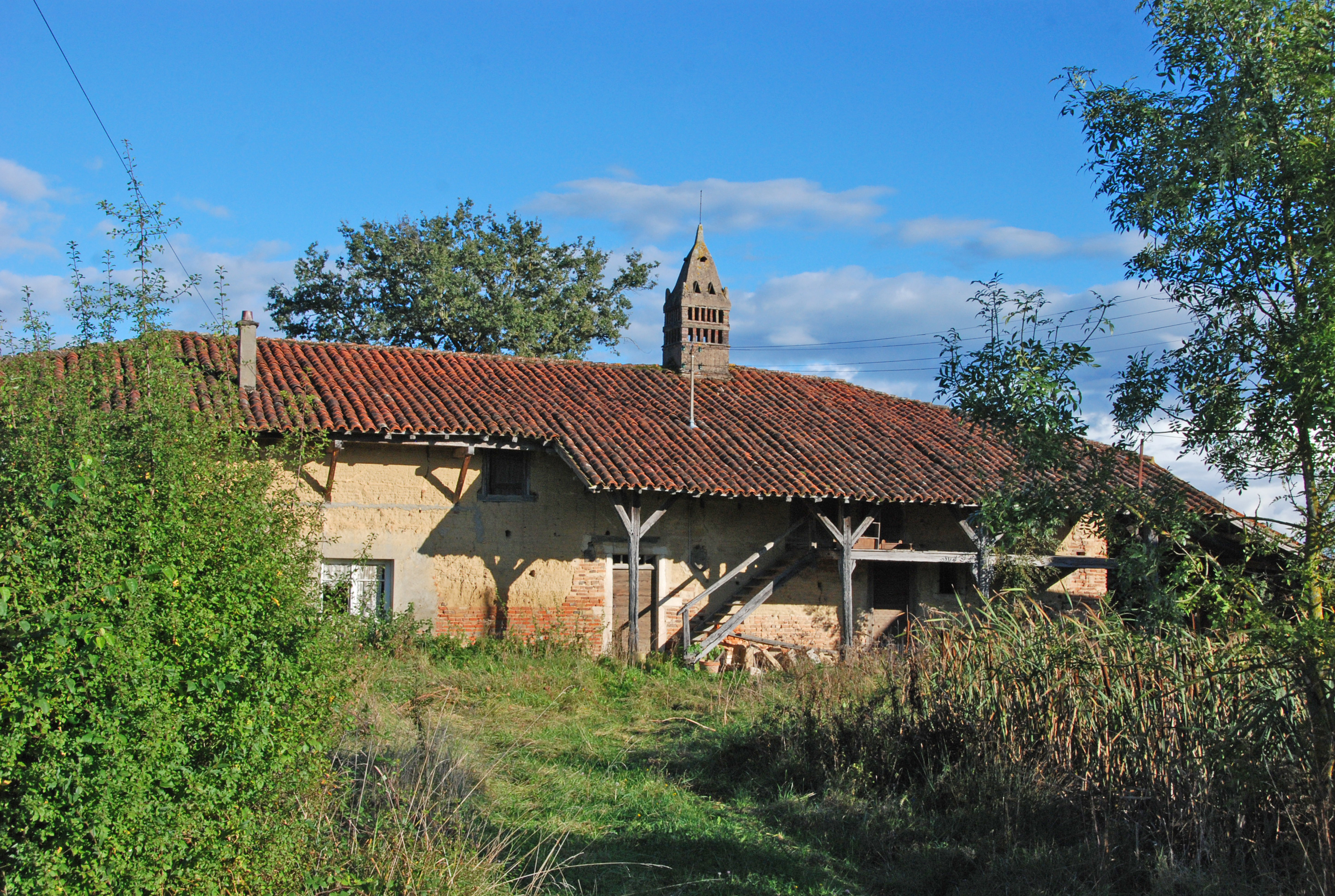 Ferme de Grandval, Grandval (Classé, 1981) .